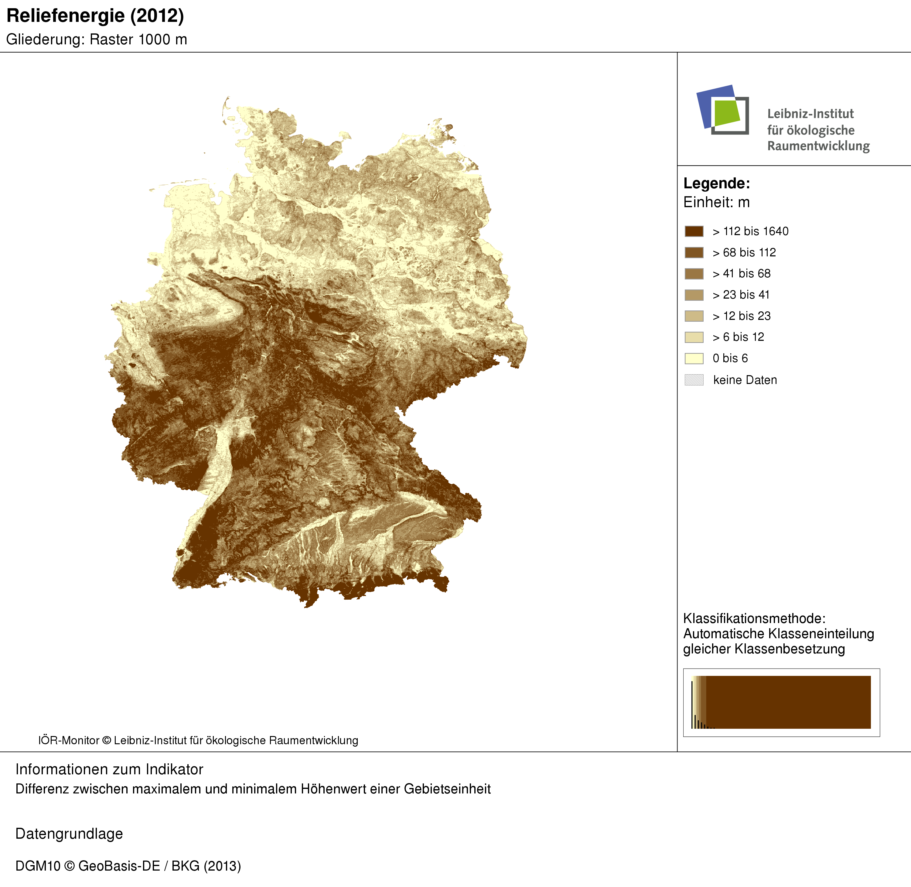 Die räumliche Auflösung ist in dem Kartenbeispiel eine Rasterzelle mit einer Flächengröße von 1 km². Die Mittelgebirgsregionen sowie Ausläufer der Alpen treten aufgrund kleinräumig auftretender Höhendifferenzen deutlich hervor. Wie stark Gebiete durch geologische und geomorphologische Prozesse geprägt sind, ist ebenfalls beispielsweise in der Oberrheinischen Tiefebene sowie im Alpenvorland sichtbar.